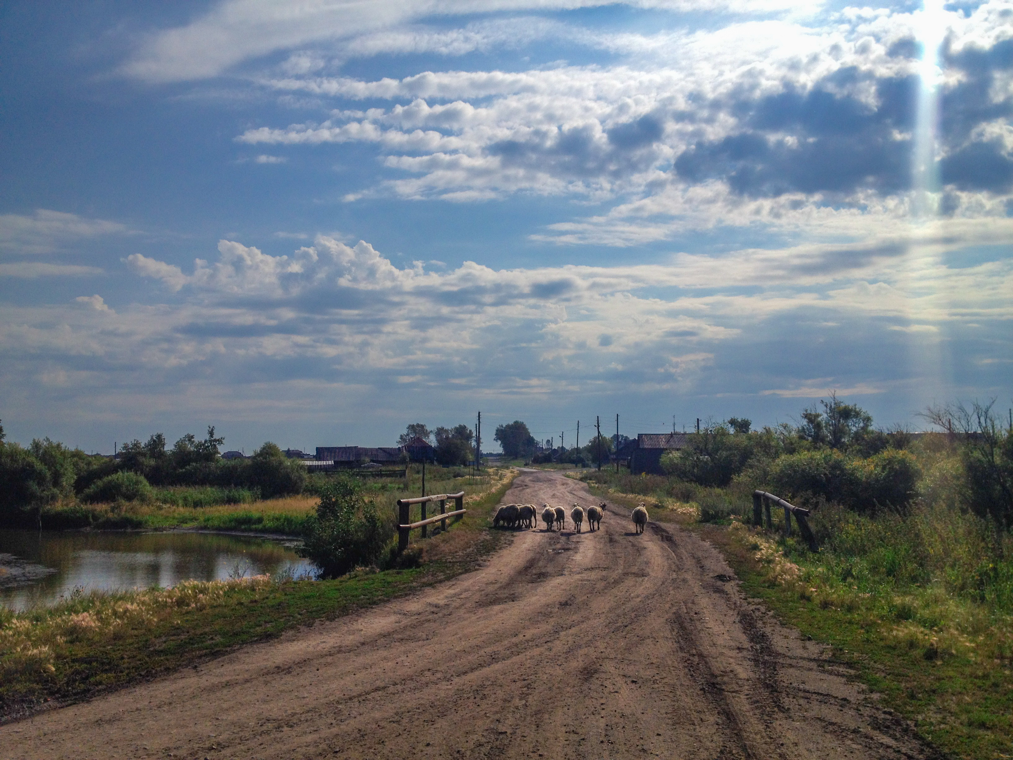 деревня Чупина, мост через реку Суетка